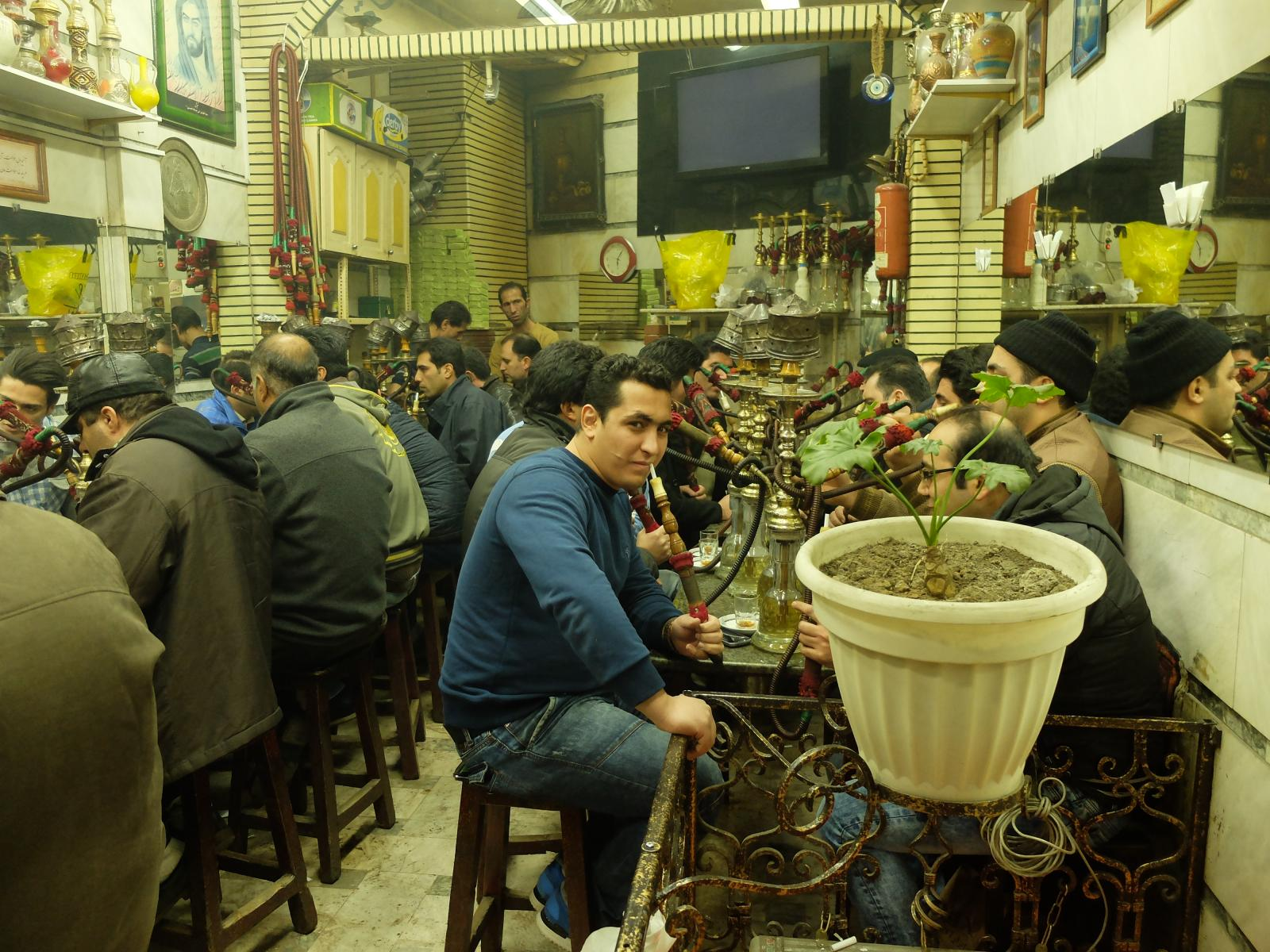 waterpipe heavy smokers